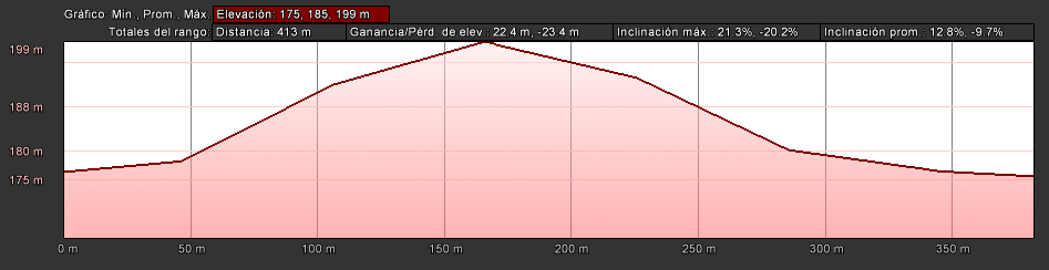 Perfíl de elevación entre las coordenadas 17°56'50.65" N 90°10'21.30"W y 17°56′37.49″N 90°10′20.94″W